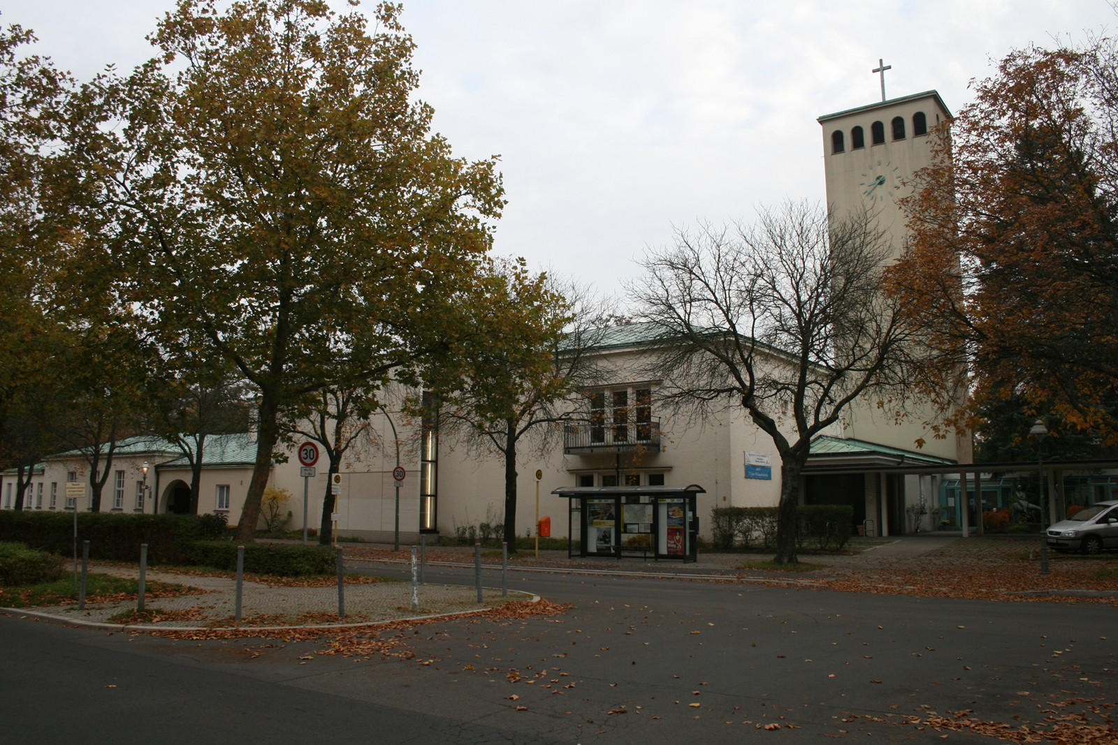 Berlin-Spandau, Haselhorster Damm 54/58. Weihnachtskirche